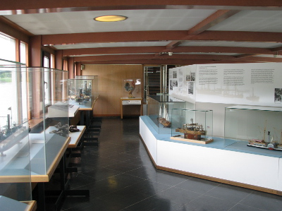 Museumsschiff in Mannheim 2010.